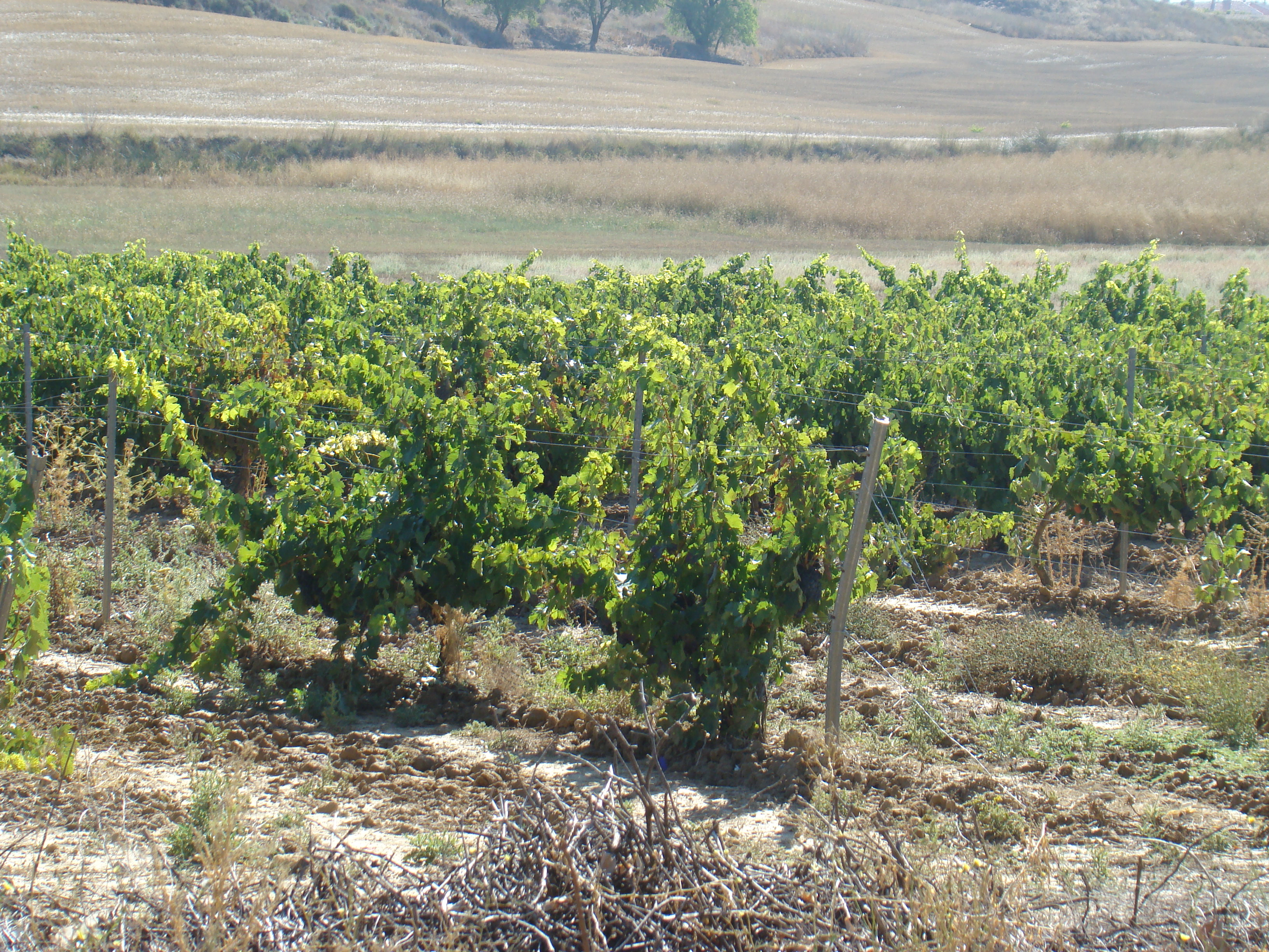 Ermita de Nuestra Señora de Viloria, a un km y medio de Cigales (Valladolid, España). Viñedos